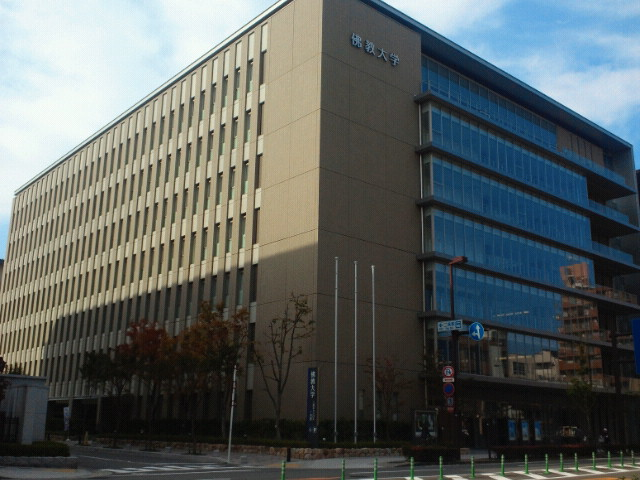 佛教大学二条キャンパス